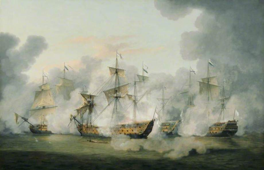 Vue centrale de la bataille de la Martinique, le 17 avril 1780, appelée aussi combat de la Dominique. Guerre d'Indépendance américaine. Escadre de Guichen contre escadre de Rodney.